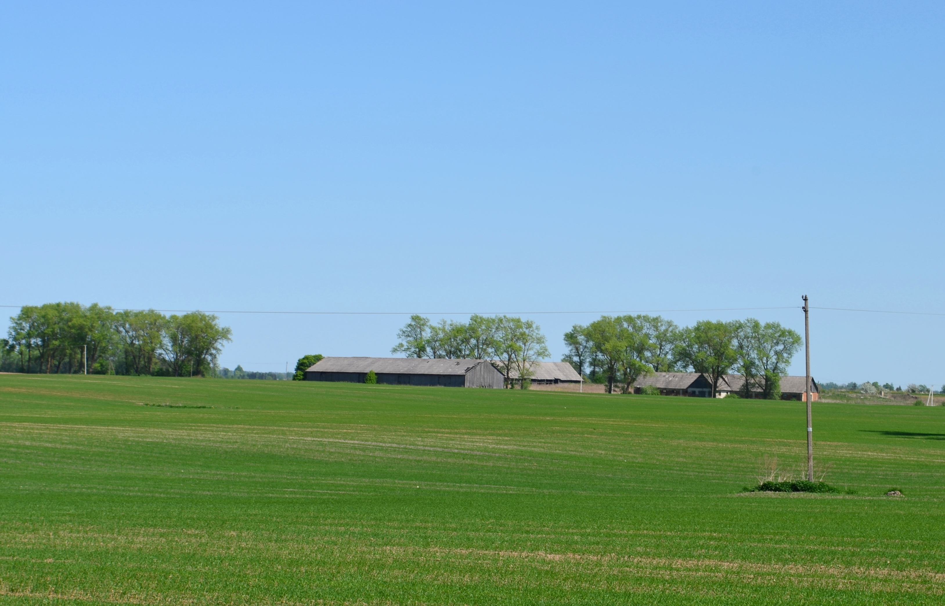 Maželių fermos, Kavarsko sen., Anykščių raj.